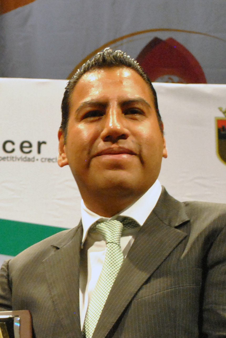 Oscar Eduardo Ramirez Aguilar